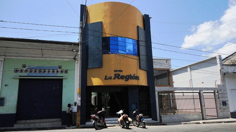 Sede principal del diario La Región en Iquitos.